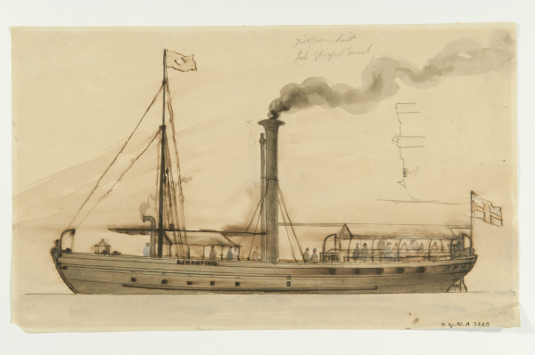 Text ur Sjöhistoriska museets årsbok "100 TING. 2010-2011": Linköping var Sveriges första propellerdrivna ångfartyg. Det byggdes vid Motala Varf i Norrköping och sjösattes 1846. Ångarens konstruktör O. E. Carlsund fick många lovord. Linköping gjorde framför allt resor mellan Stockholm och Linköping. Hon bytte senare namn till Runeberg. Efter en kort tid som bogserbåt i Örnsköldsvik totalförstördes fartyget som då hette Delphin vid en brand 1874. Akvarellen är utförd av konstnären Pehr Wilhelm Cedergren (1823-1896). En samling av hans akvareller med ångfartyg har kommit i Sjöhistoriska museets ägo genom gåva på 1930-talet.